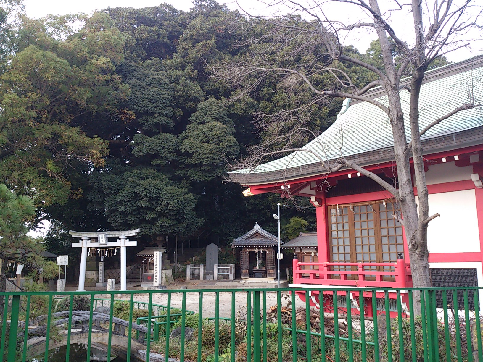 浅間神社（松戸）